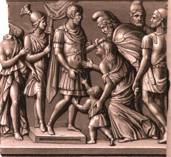 incisione da bassorilievo dell'Arco di Lucio Vero e Marco Aurelio